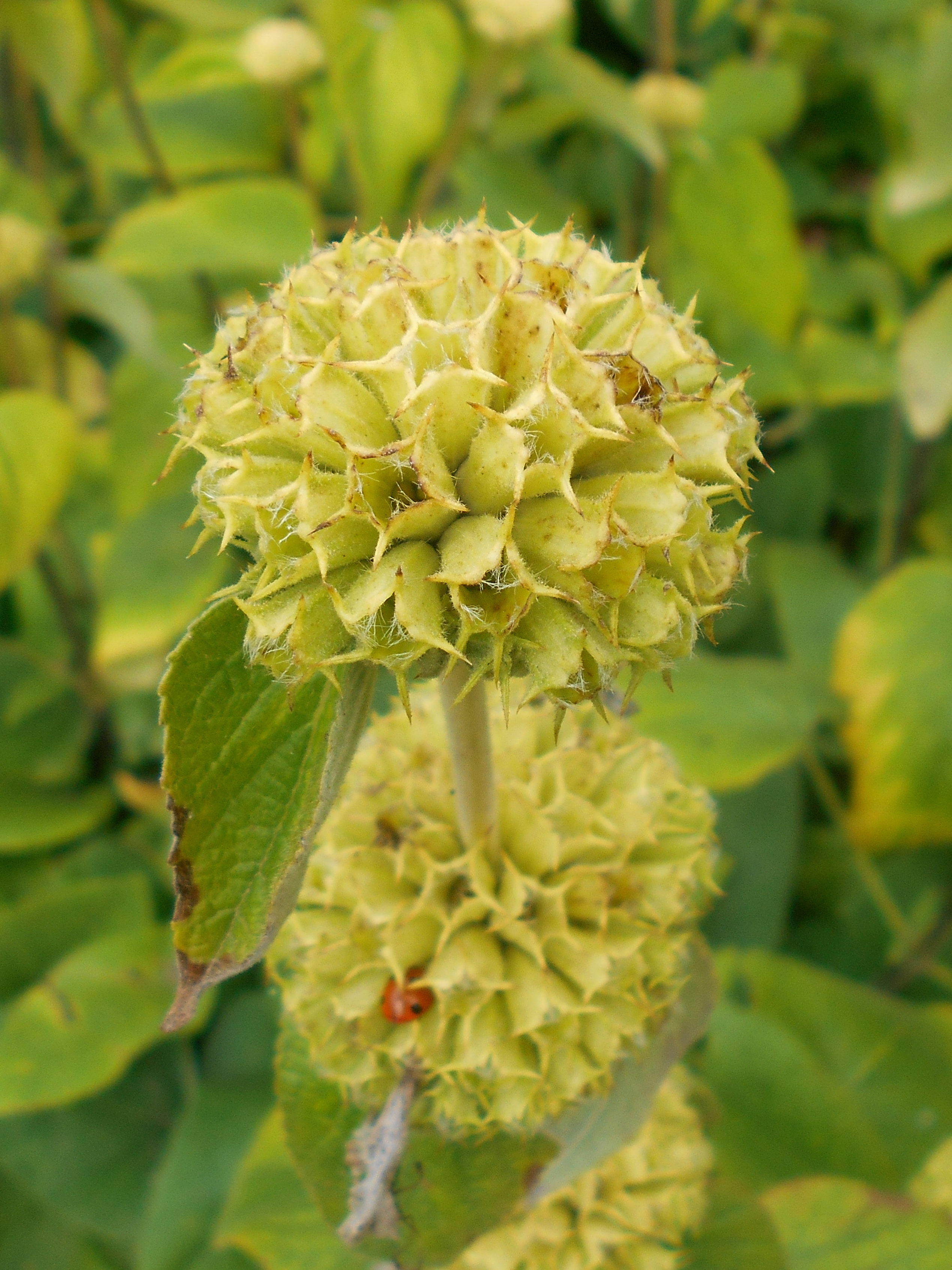 Żeleźniak Russela (Phlomis russeliana), Ogród Botaniczny UMCS w Lublinie.